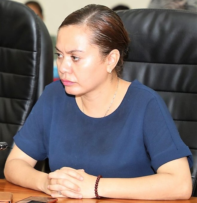 Élia António de Araújo dos Reis Amaral, stellvertretende Gesundheitsministerin Osttimors